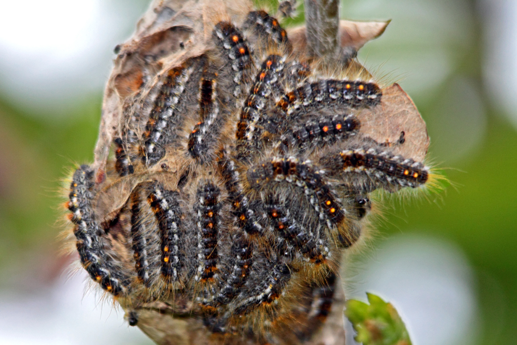 Raupengespinst des Goldafter